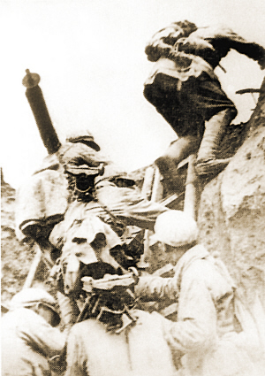 兰州战役中，解放军战士登上陡壁向阵地攻击。